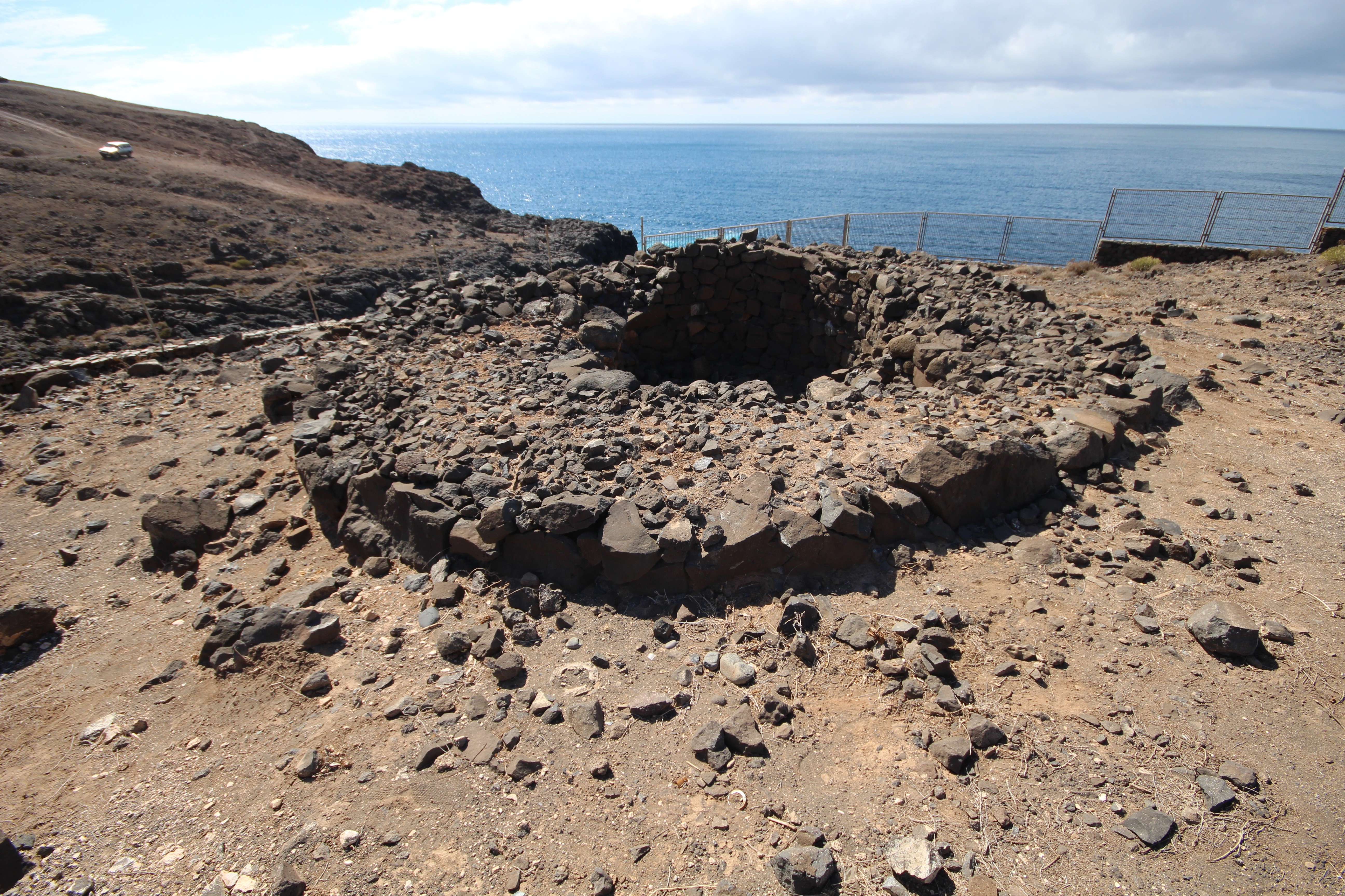 Gáldar, Gran Canaria.